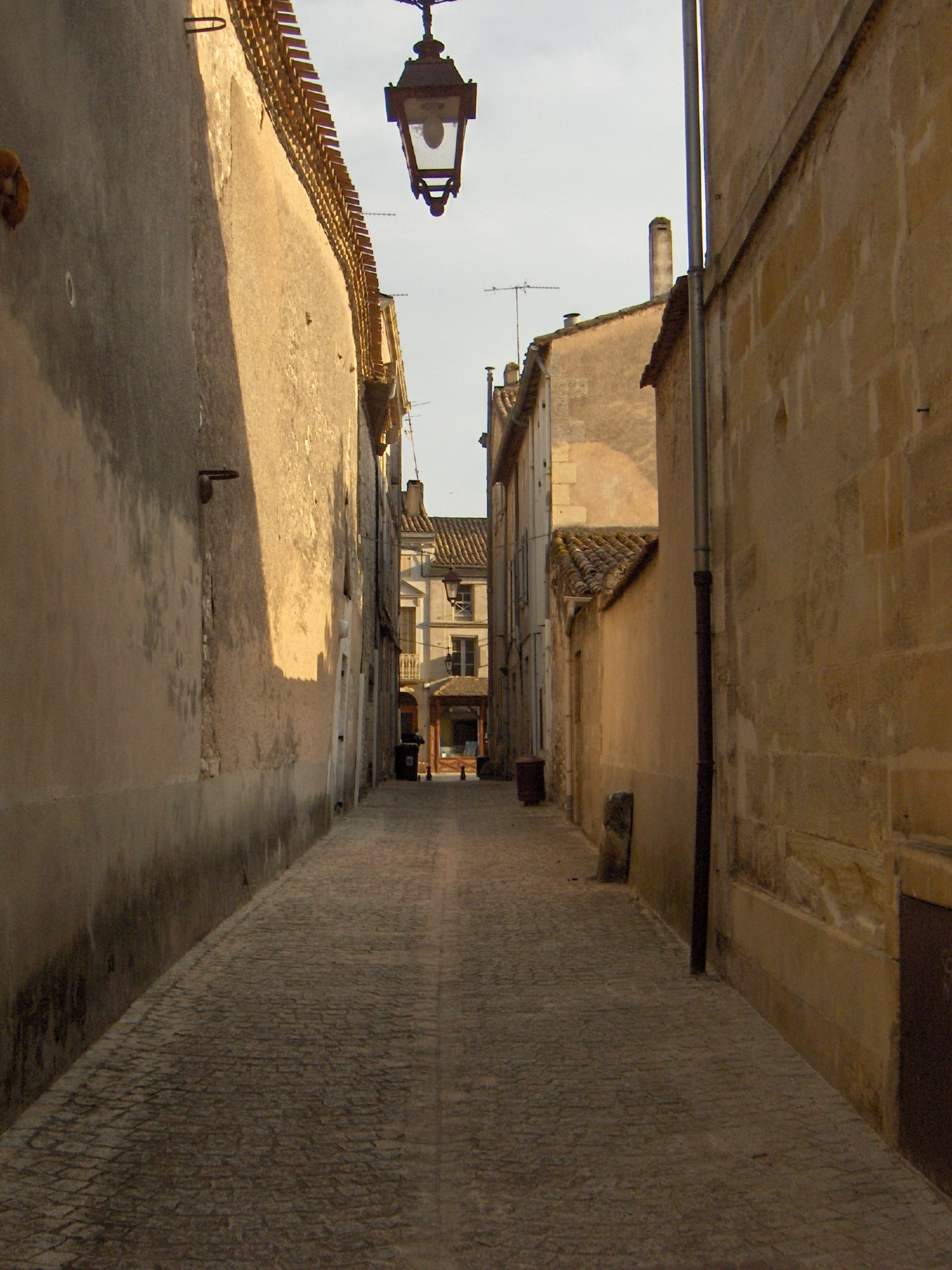 Photographie de Sainte-Foy-la-Grande en Gironde. ©éréales Kille® ☺